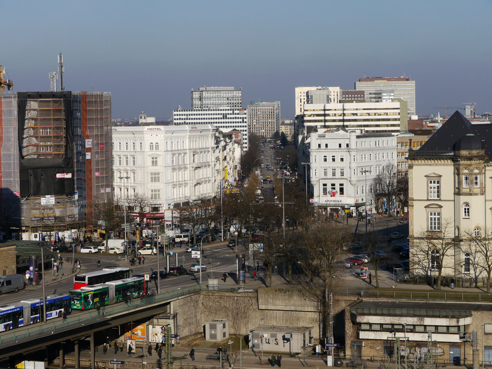 St.Georg Steindamm, Blick nach Osten